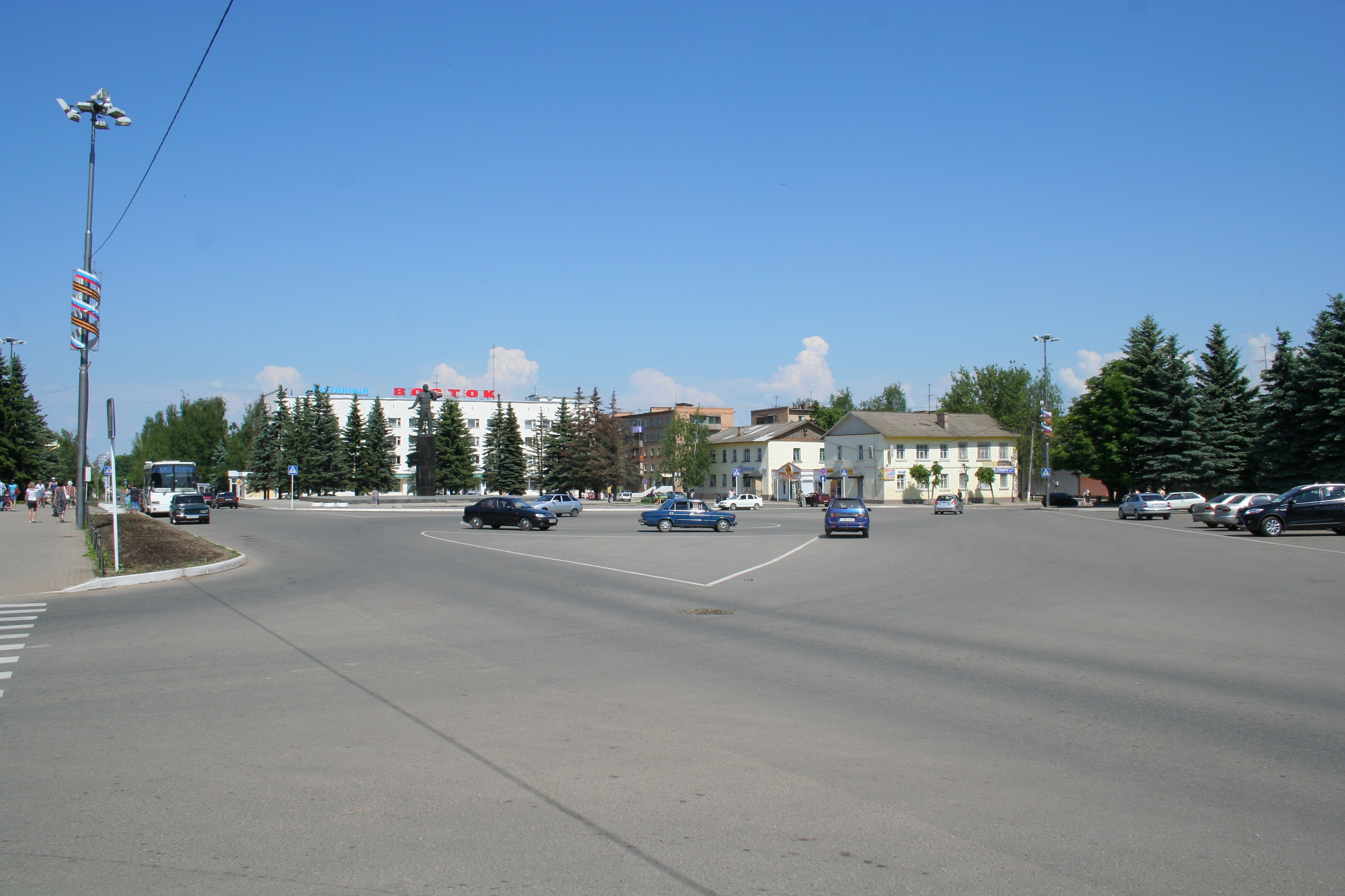 Stadt Gagarin (ehem. Gschatsk), Oblast Smolensk, Russland. Zentraler Platz.